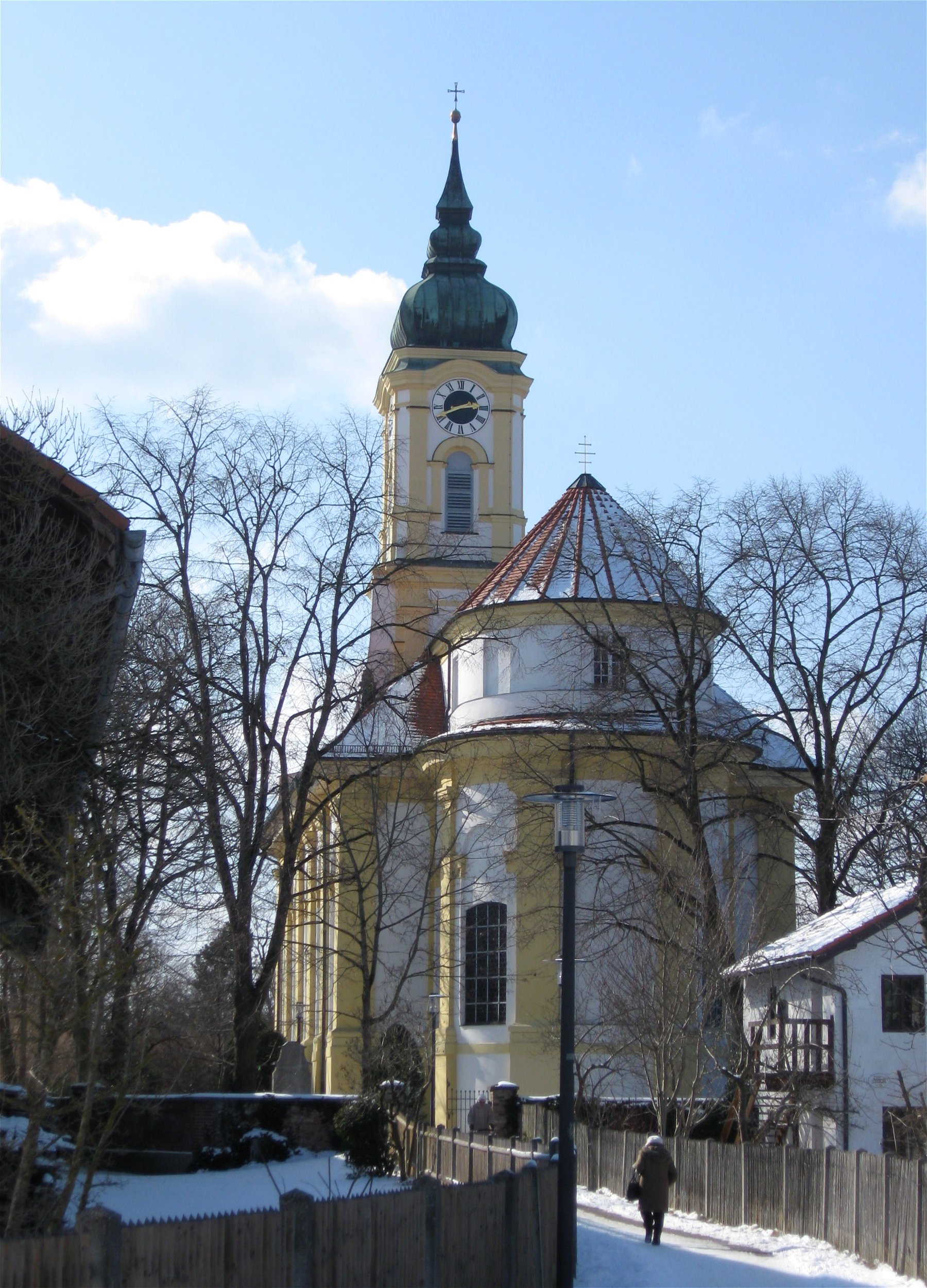 Kirche St. Michael in München-Perlach